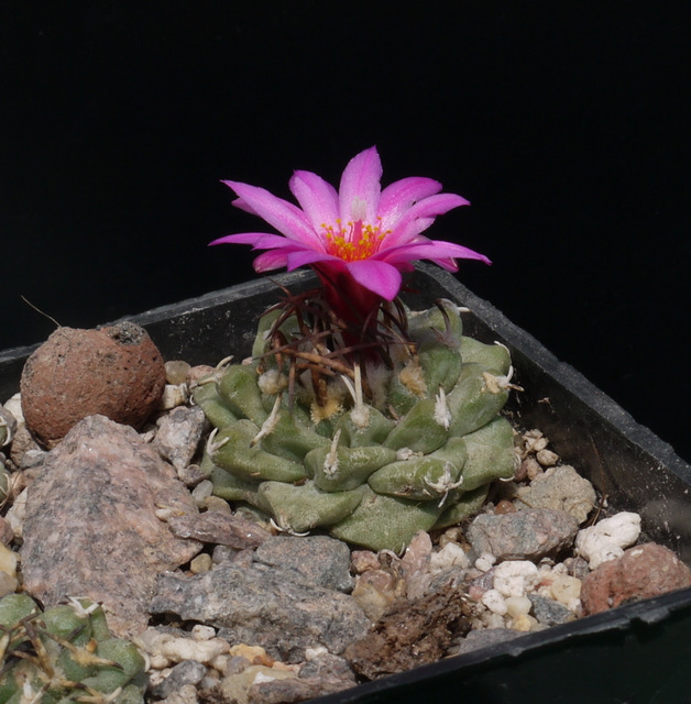 Turbinicarpus alonsoi, Xichu, GTO.